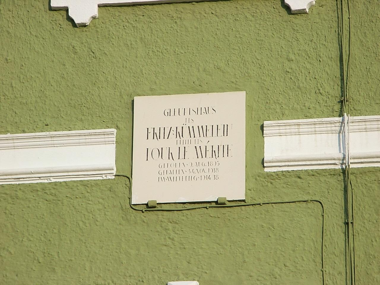 Beschreibung: Gedenktafel an Fritz Rümmeleins Geburtshaus Quelle: Bild selbst erstellt Datum: 9. November 2006 Autor: Konrad Lackerbeck